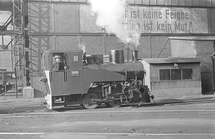 Hoesch Westfalenhütte 99 (11") (800 mm), Jung 10607/1950 (1950-57)